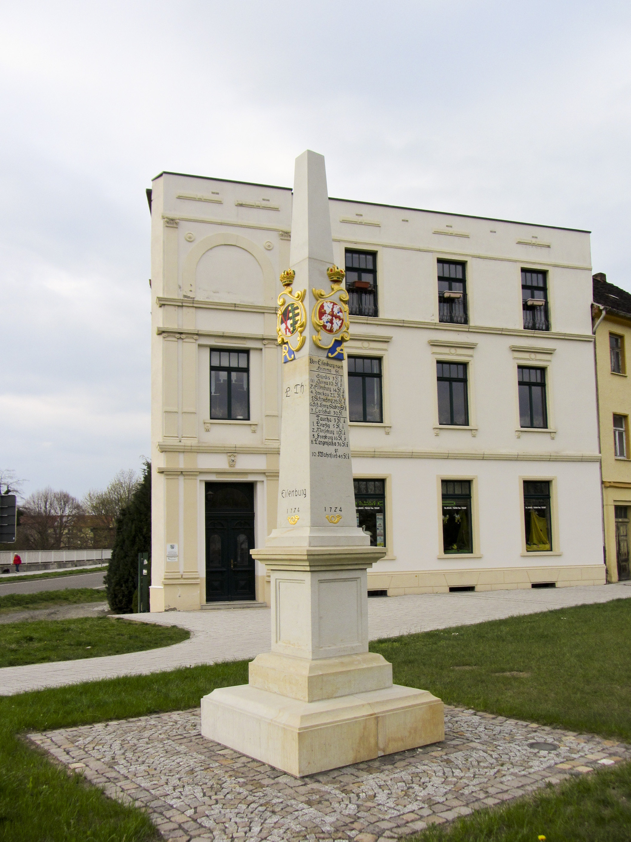 Kursächsische Postmeilensäule-Distanzsäule, bei Leipziger Straße 28 in Eilenburg